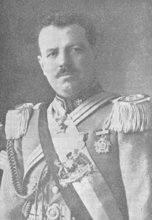 Fotografía de Carlos Ibáñez del Campo, Presidente de Chile (1927-1931; 1952-1958)